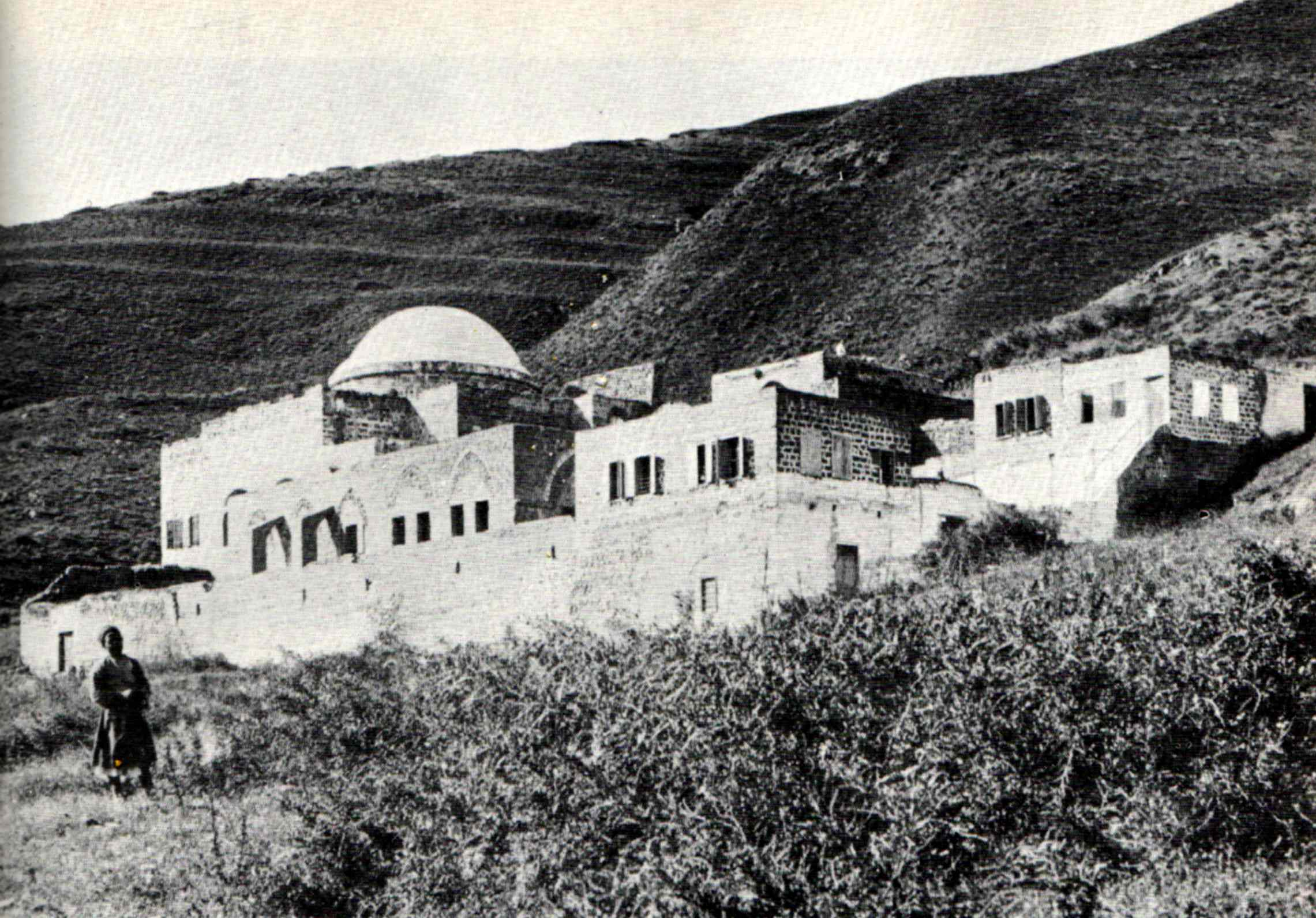 קבר רבי מאיר בעל-הנס